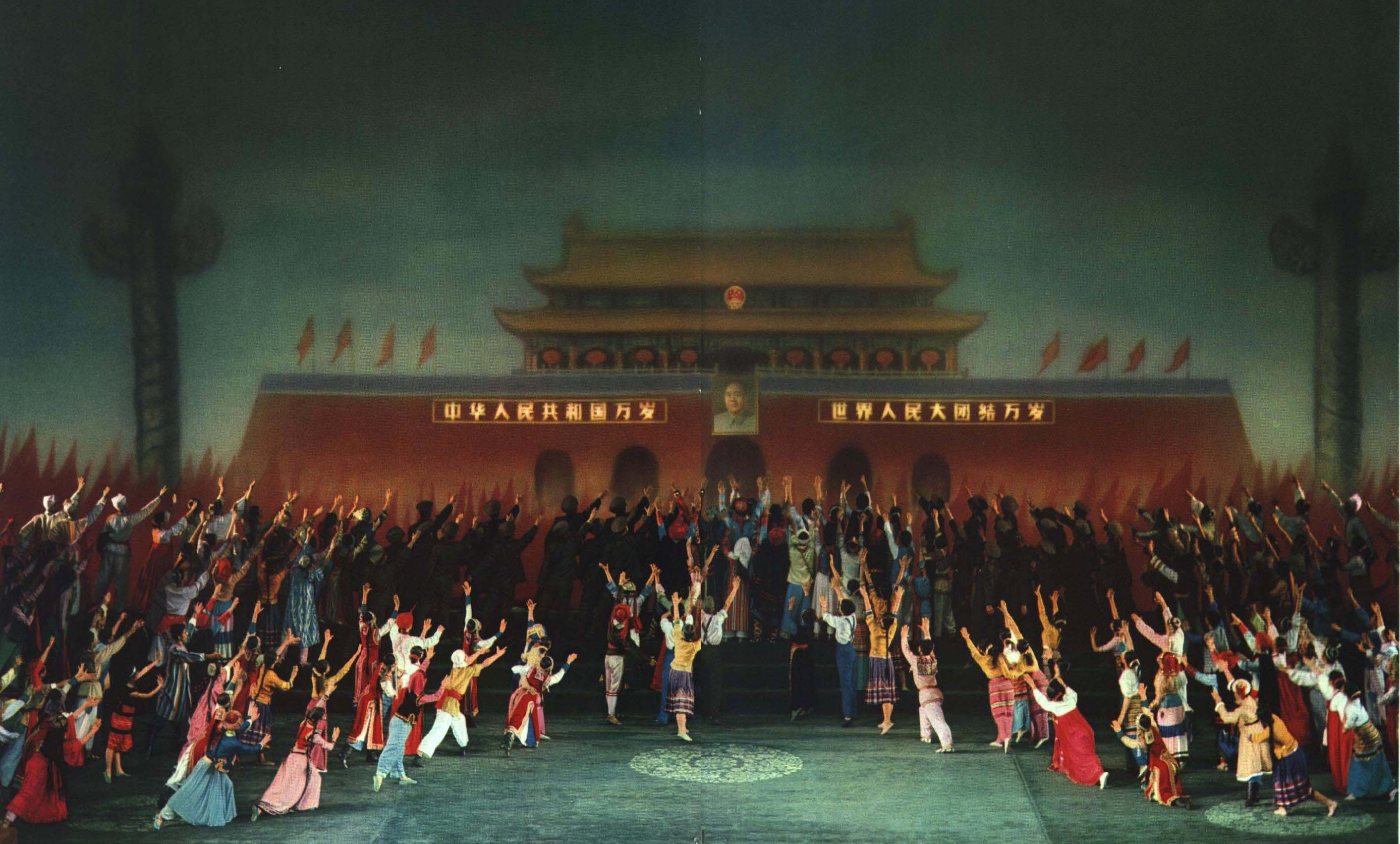 1964-11 1964年 东方红 歌剧